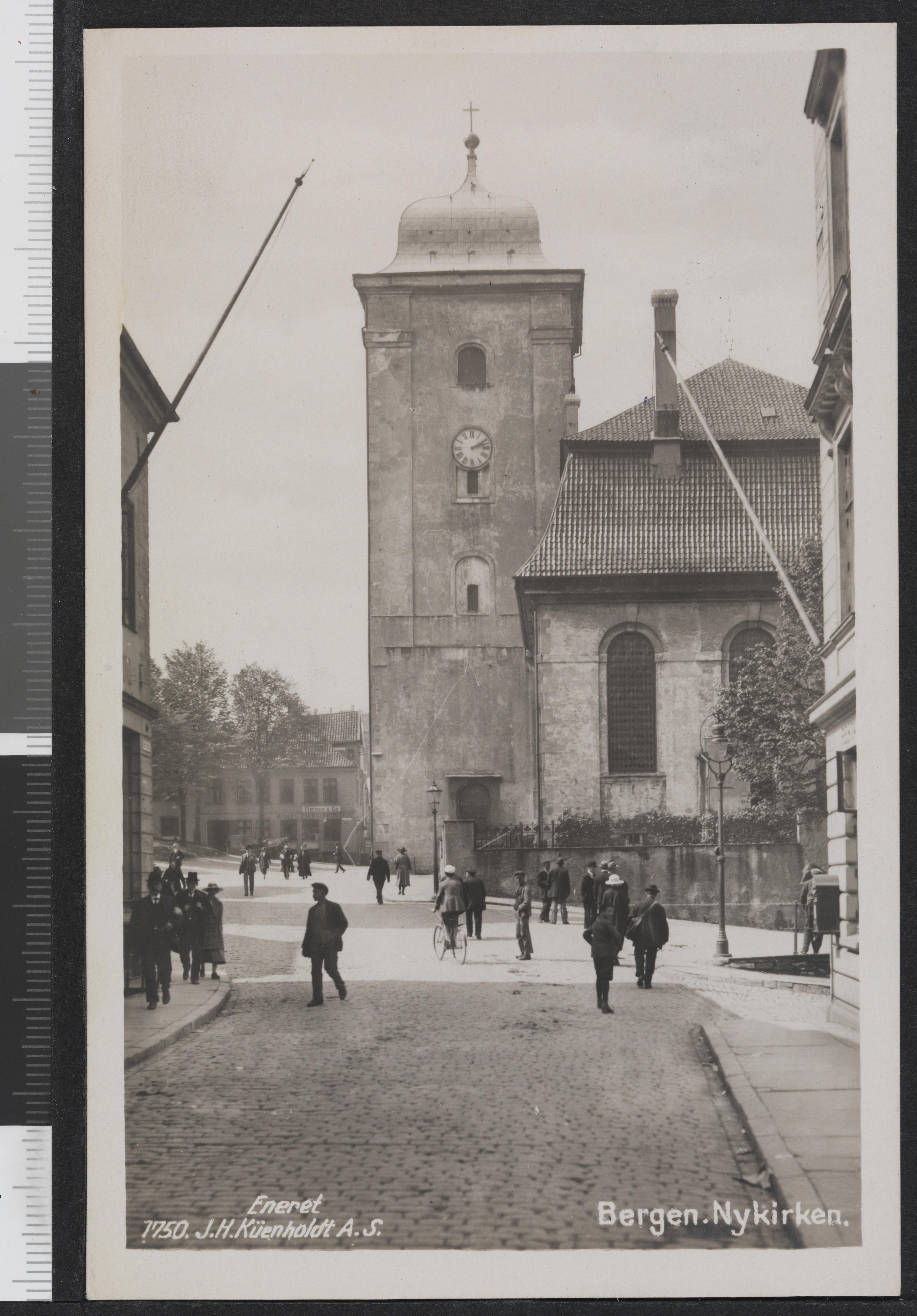 Bildet er hentet fra Nasjonalbibliotekets bildesamling Bergen, Hordaland